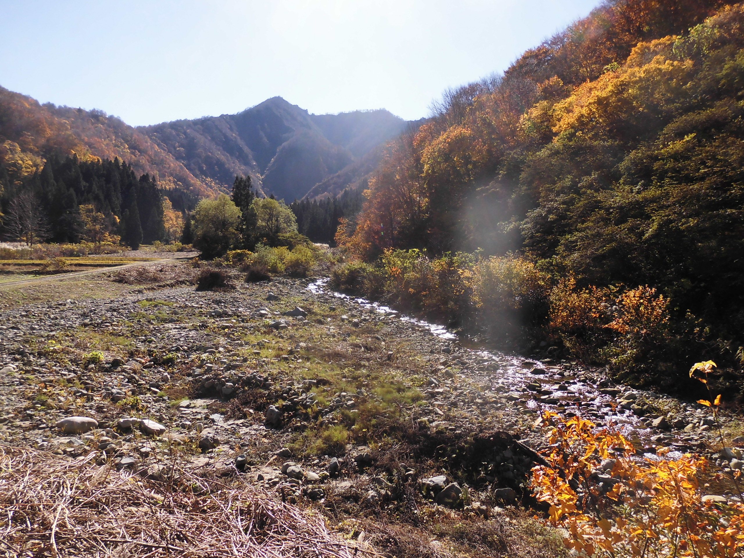 清水西谷後川